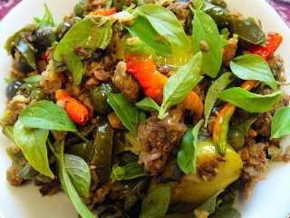 Ulekutek Oncom